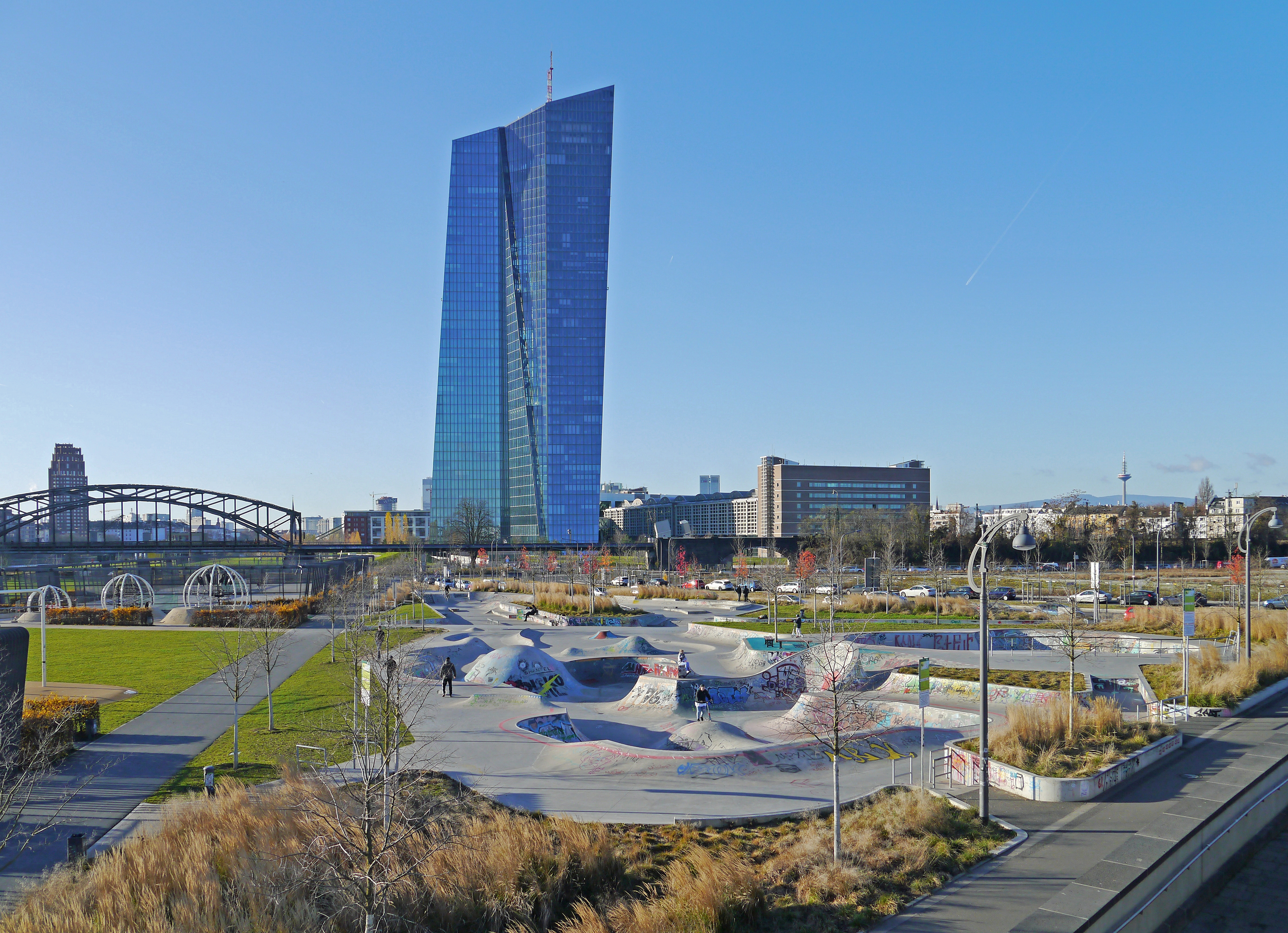 Der Skatepark im Frankfurter Hafenpark, neben der Hauptverwaltung der Europäischen Zentralbank.